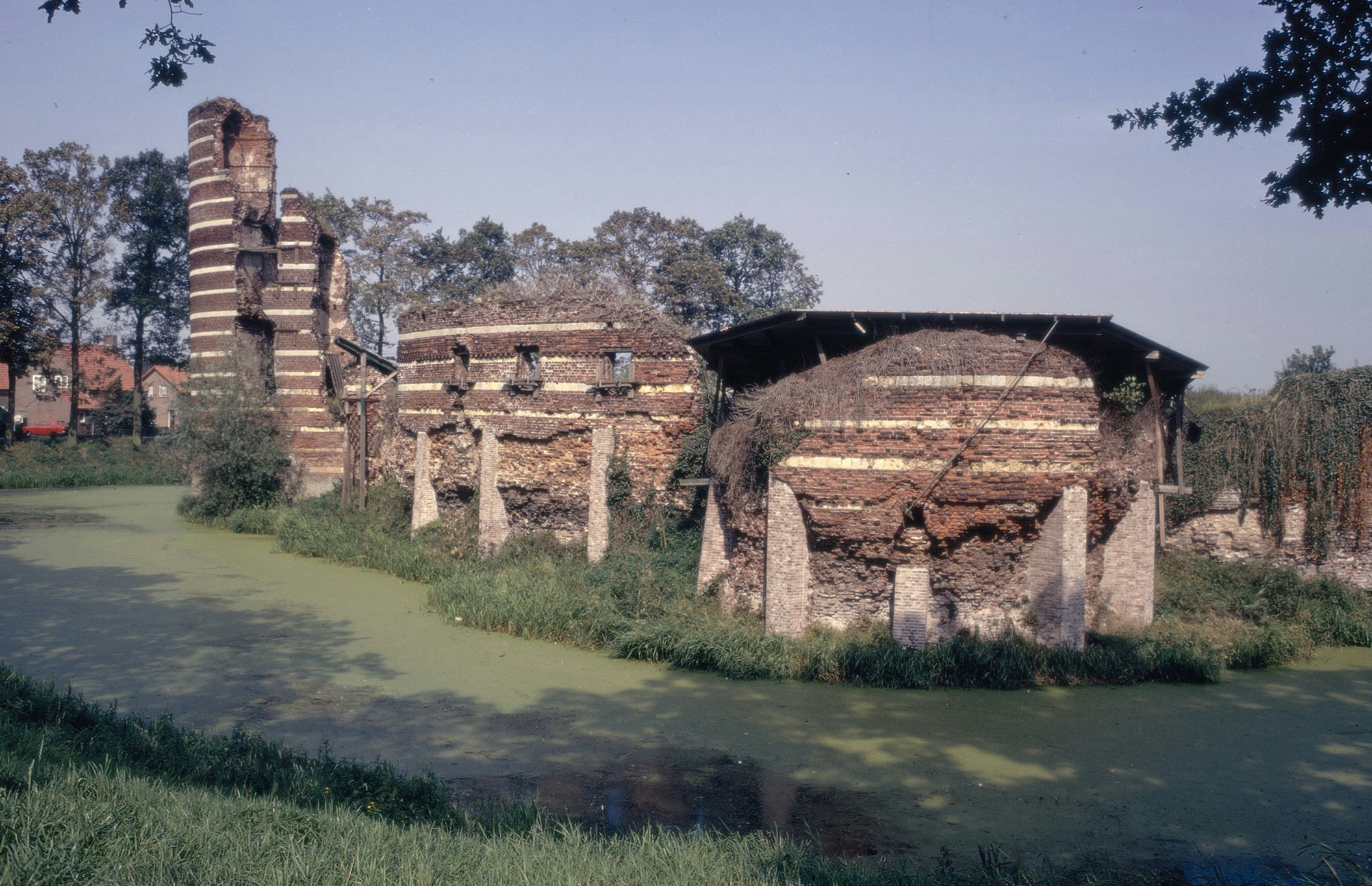 V.M. KASTEEL / RUINE: Exterieur OVERZICHT